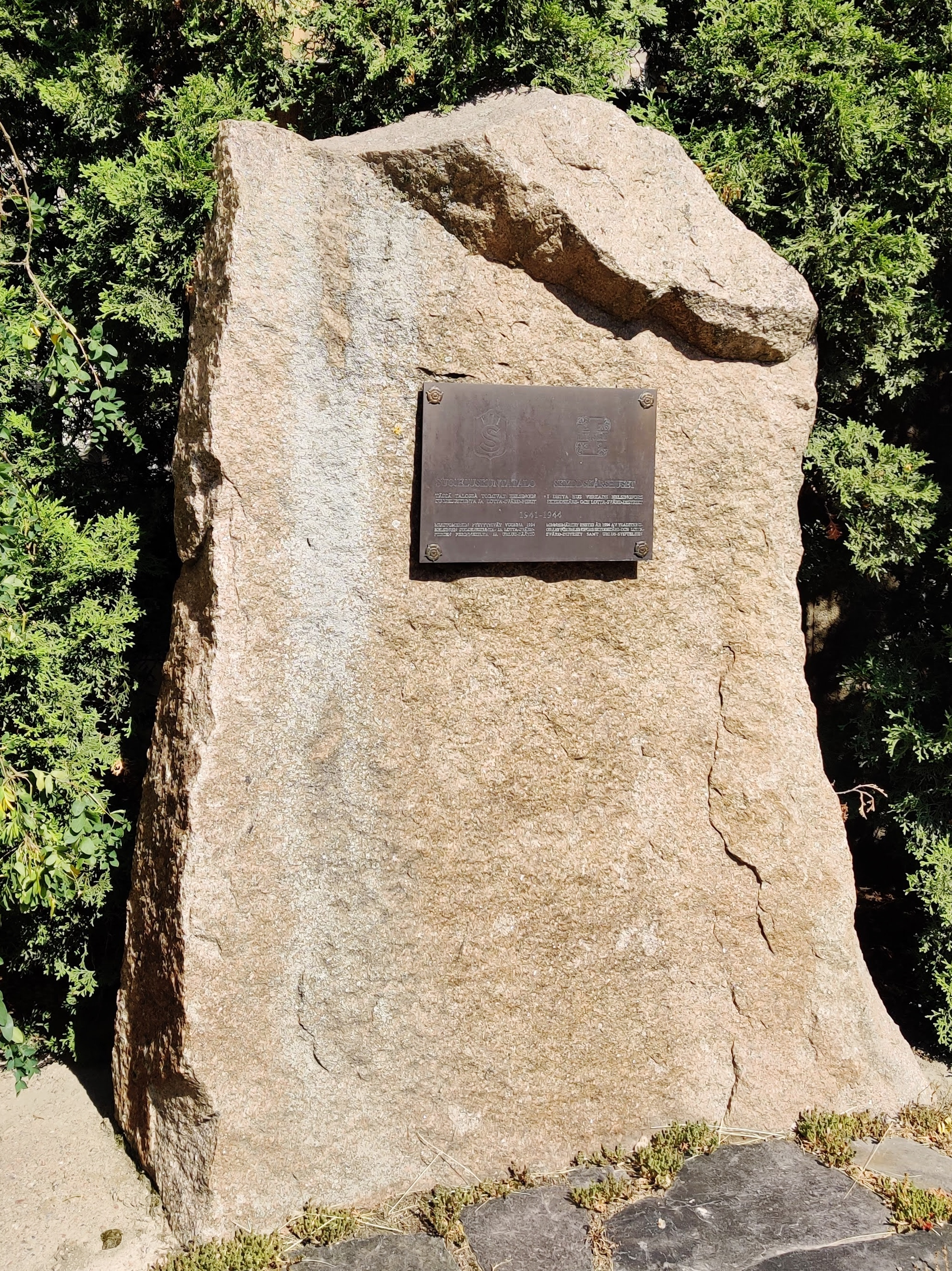 Paasi ja muistolaatta Helsingin suojeluskuntatalon vieressä